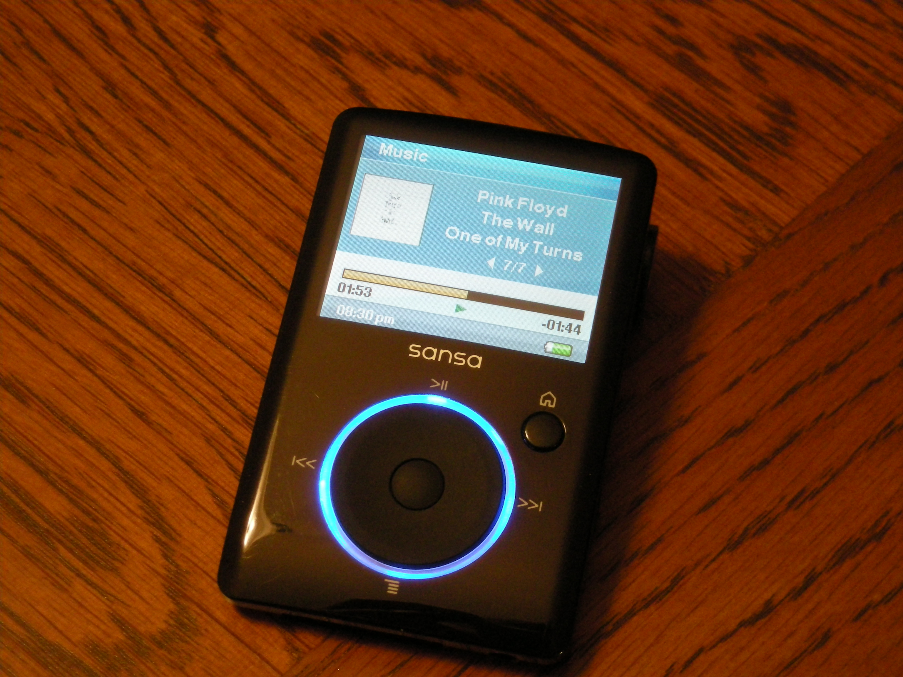 4GB Sansa Fuze